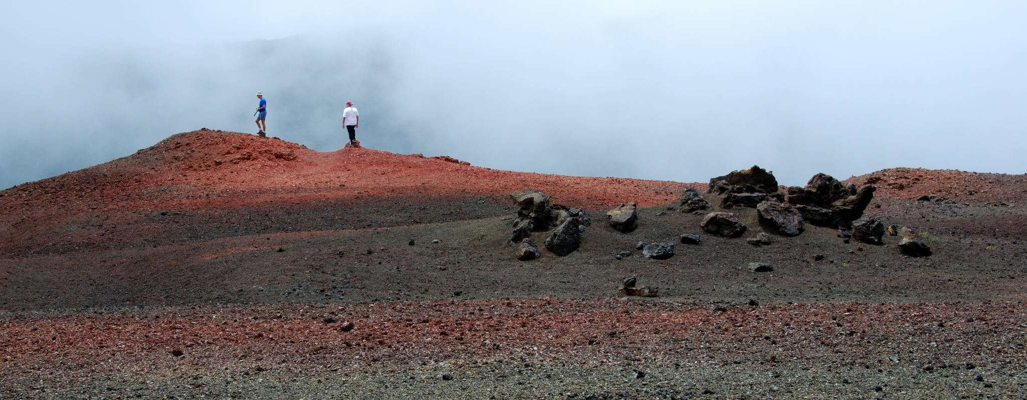 Des marcheurs sur une petite éminence de la Plaine des sables, à La Réunion.